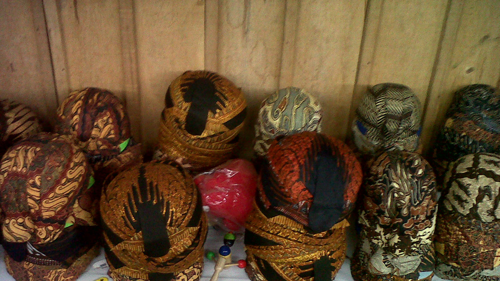 Blangkon